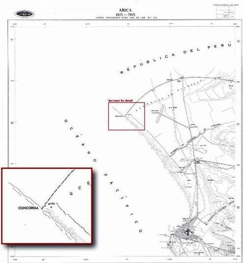 Mapa de Arica 1966, del Instituto Geográfico Militar de Chile, con ampliación y destacado de la linea fronteriza con el Perú, Concordia, Hito 1. Documento presentado por el Gobierno del Peru ante la Corte Internacional de Justicia en la Controversia Marítima (Perú v. Chile)